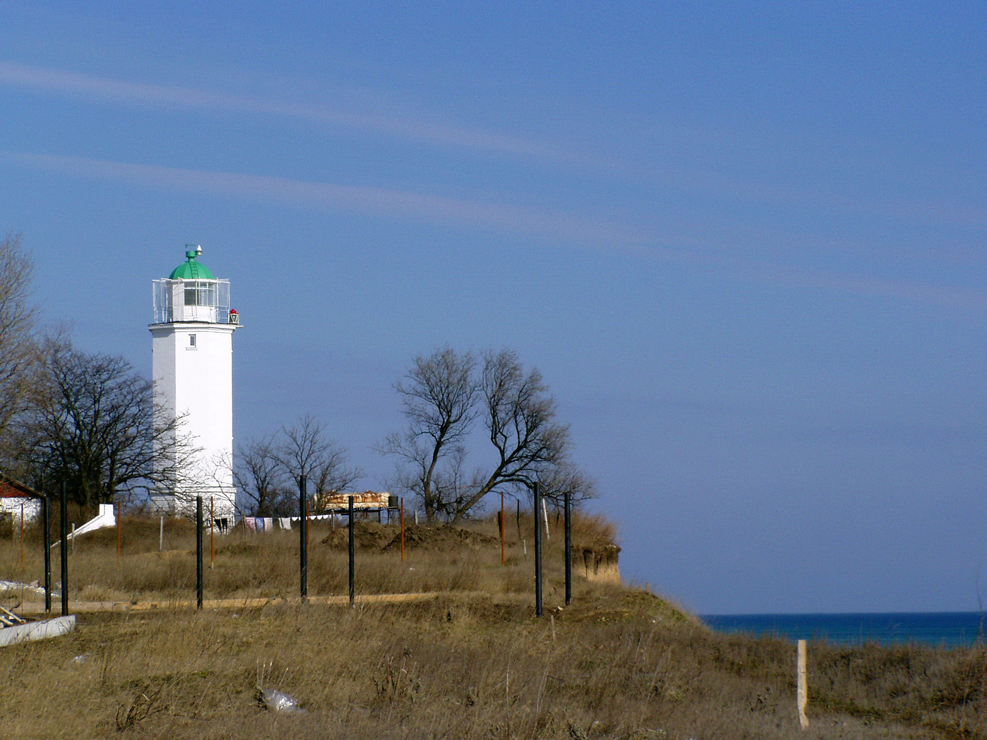 Маяк Санжейський, с. Санжійка